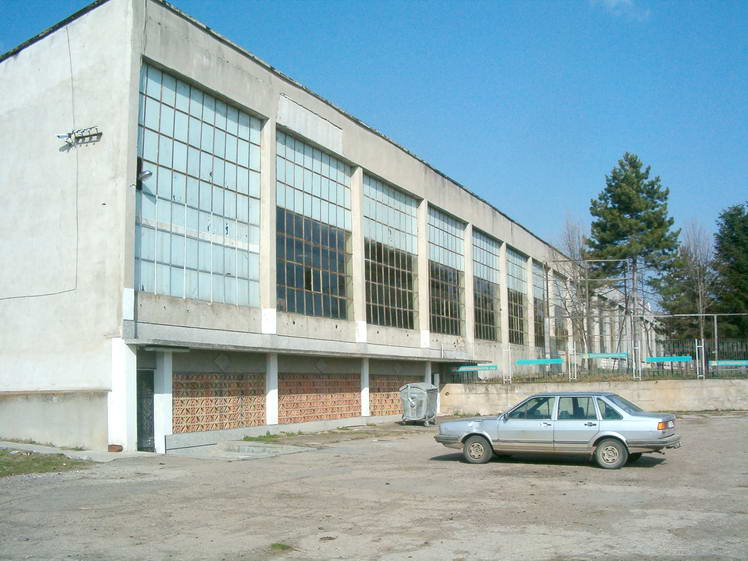 Сградата на електороапаратурния завод в село Ковачевец, Поповско - 2006 год.